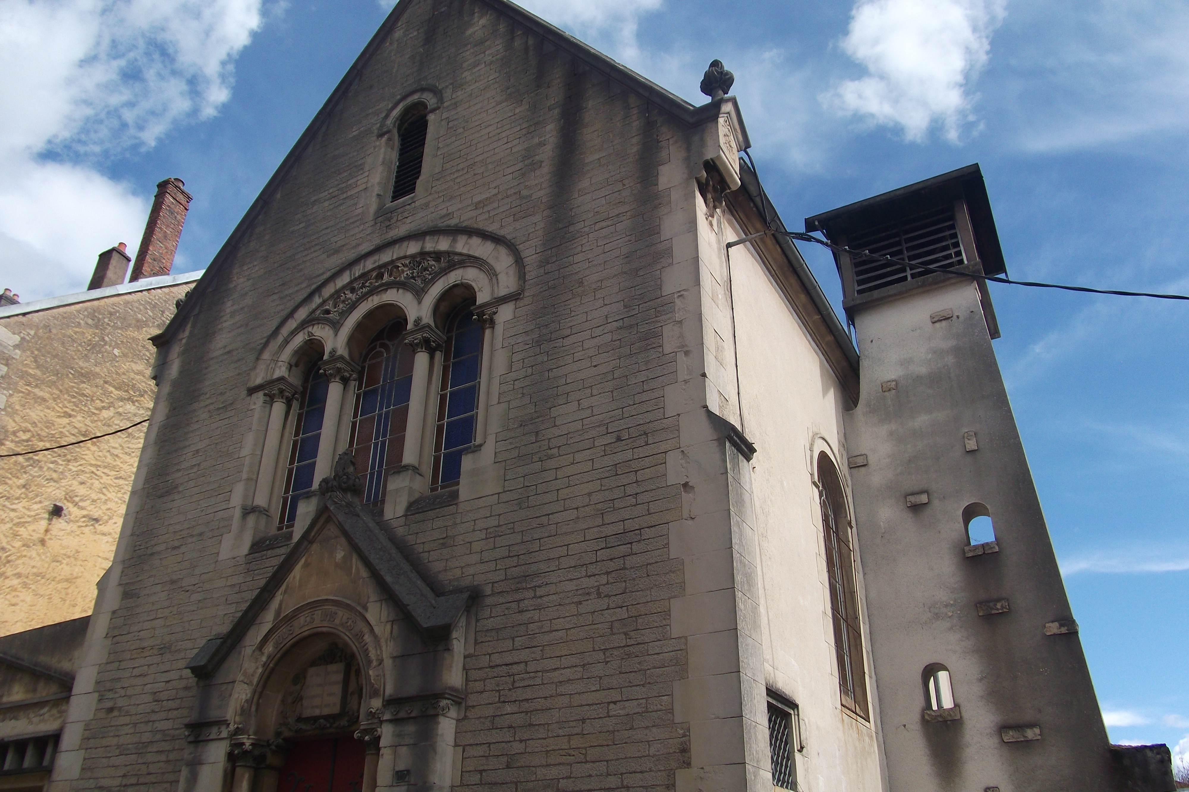 La façade d'entrée du temple protestant de Vesoul (Haute-Saône, Franche-Comté)